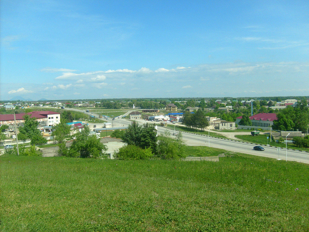 Посёлок Залукокоаже в Зольском районе КБР